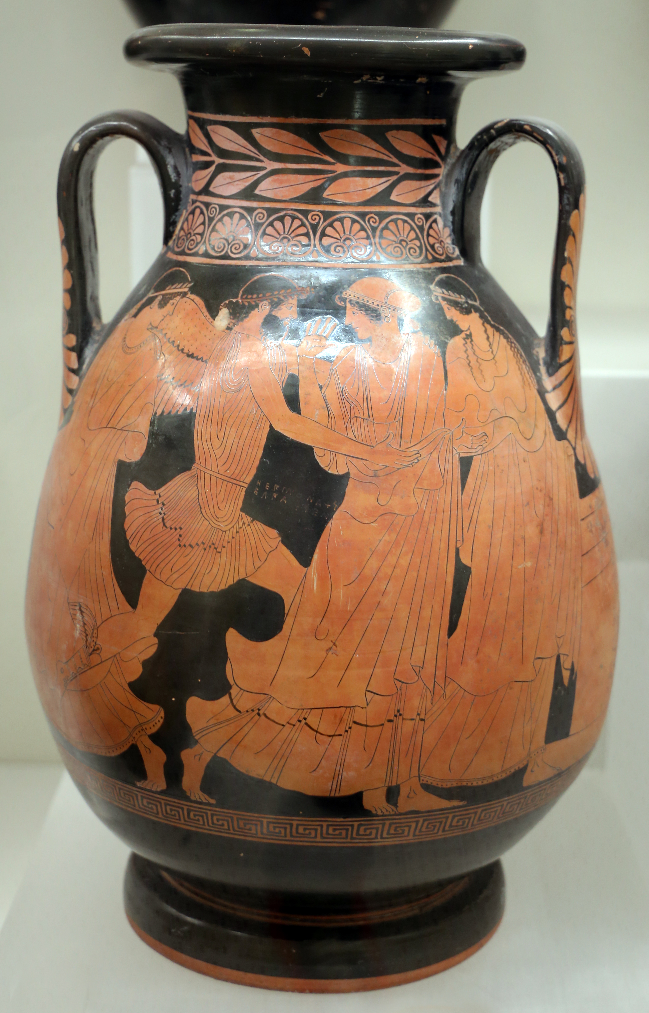 Villa Giulia (Rome) This is a photo of a monument which is part of cultural heritage of Italy.